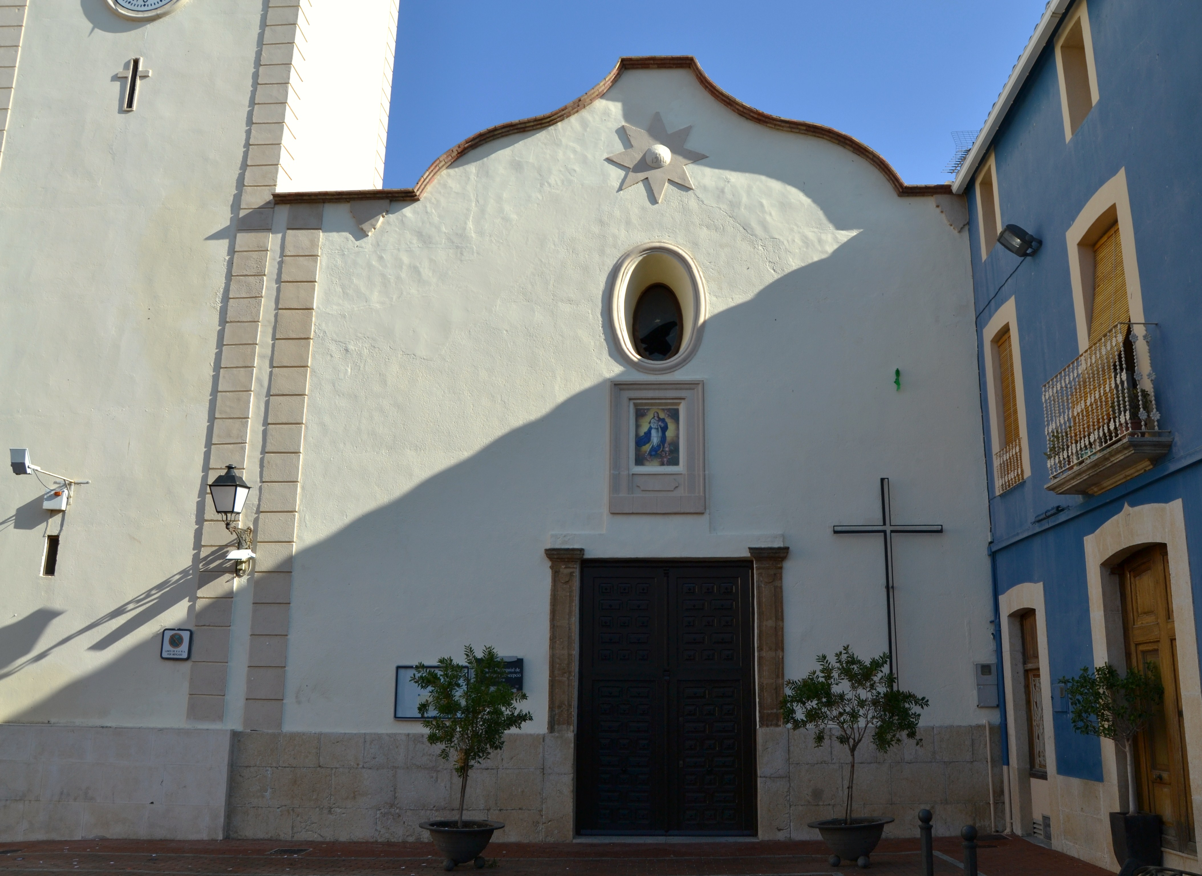 Façana de l'església de la Puríssima Concepció de Parcent. 30.100-002.